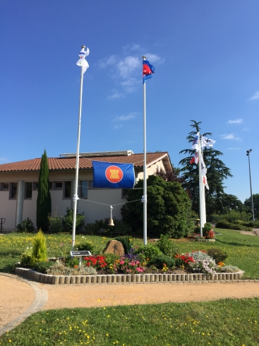 Cérémonie du 15 juillet 2016 ayant eu lieu au Mémorial Niten-Ichi-Ryu métant l’ASEAN et le Cambodge à l’honneur.